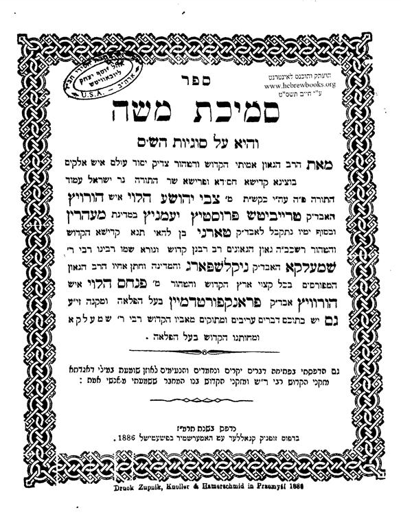 Titulni stranka Smichat Moše, Přemyšl, 1886